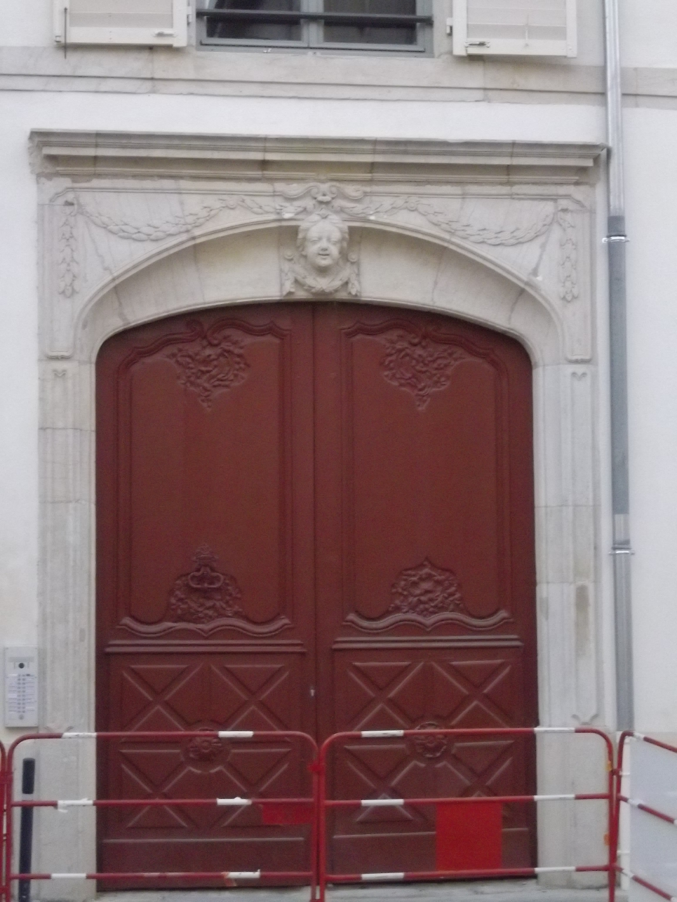 42 rue des Quatre Eglises, Nancy